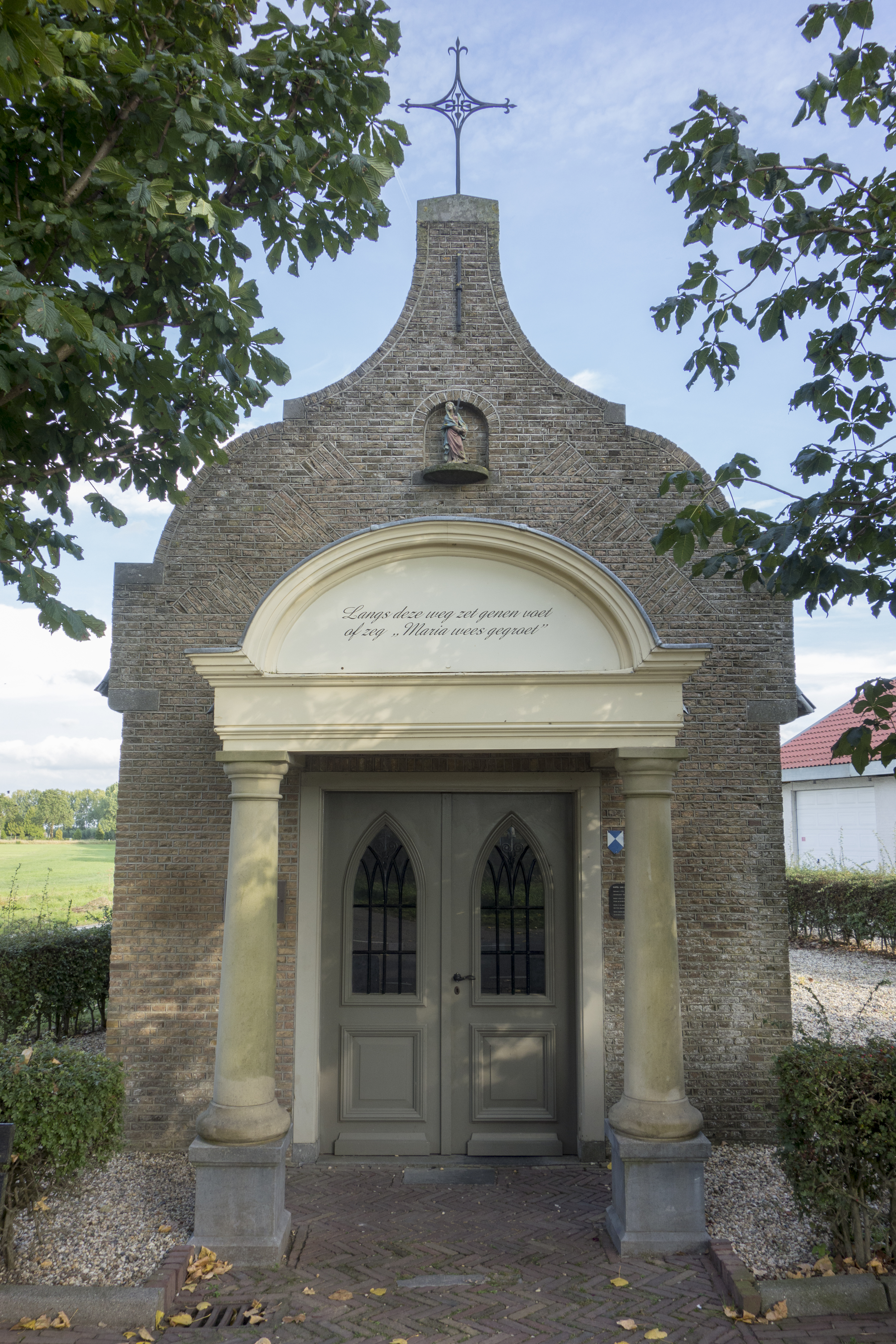 Voorgevel met ingangspartij van de Kapel der Zeven Weeën nabij Megen.